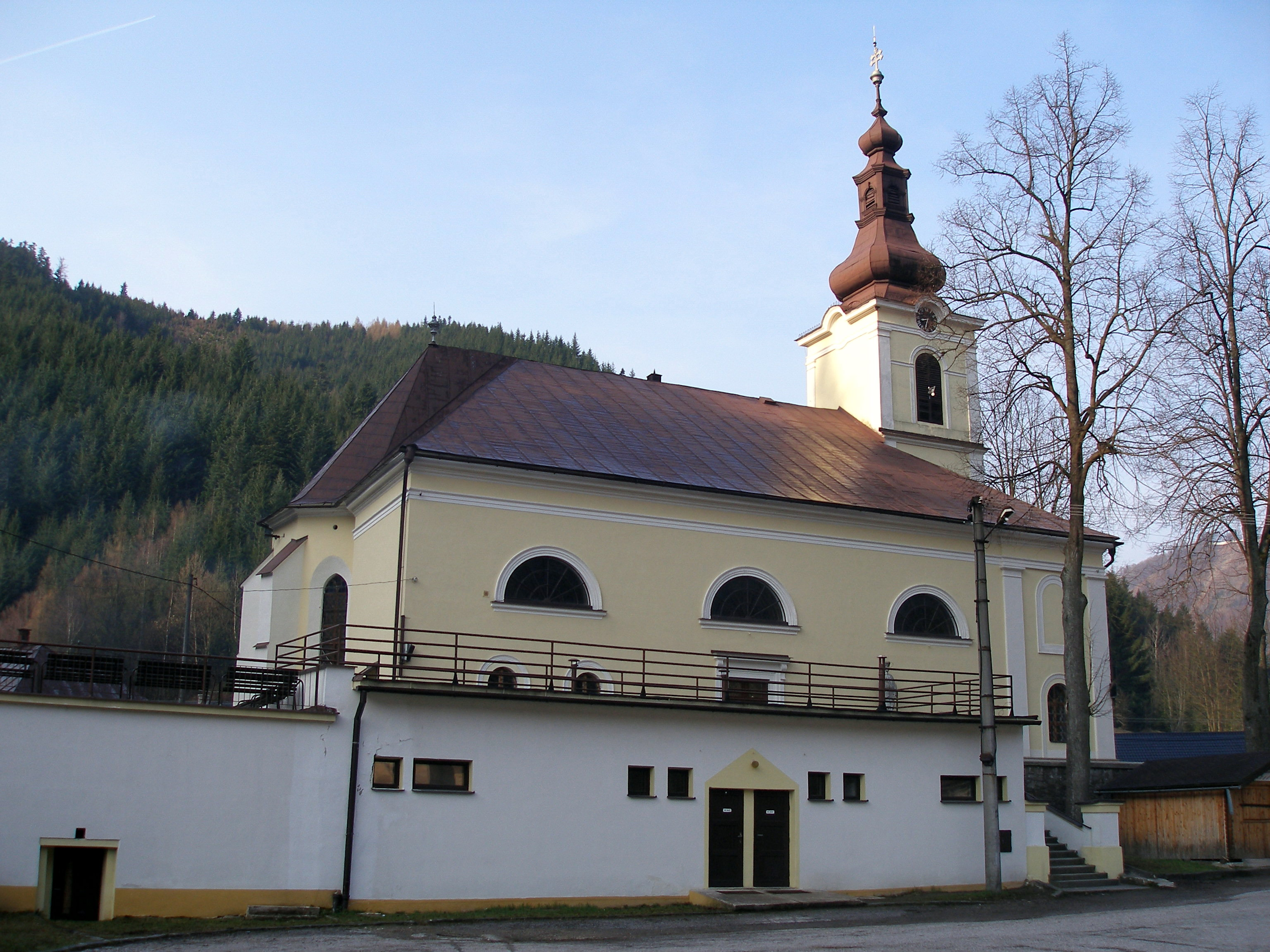 Obec Staré Hory v okrese Banská Bystrica. Od 1. augusta 1990 Pápež Ján Pavol II. ustanovil Kostol Navštívenia Preblahoslavenej Panny Márie, na Baziliku minor na Starých Horách